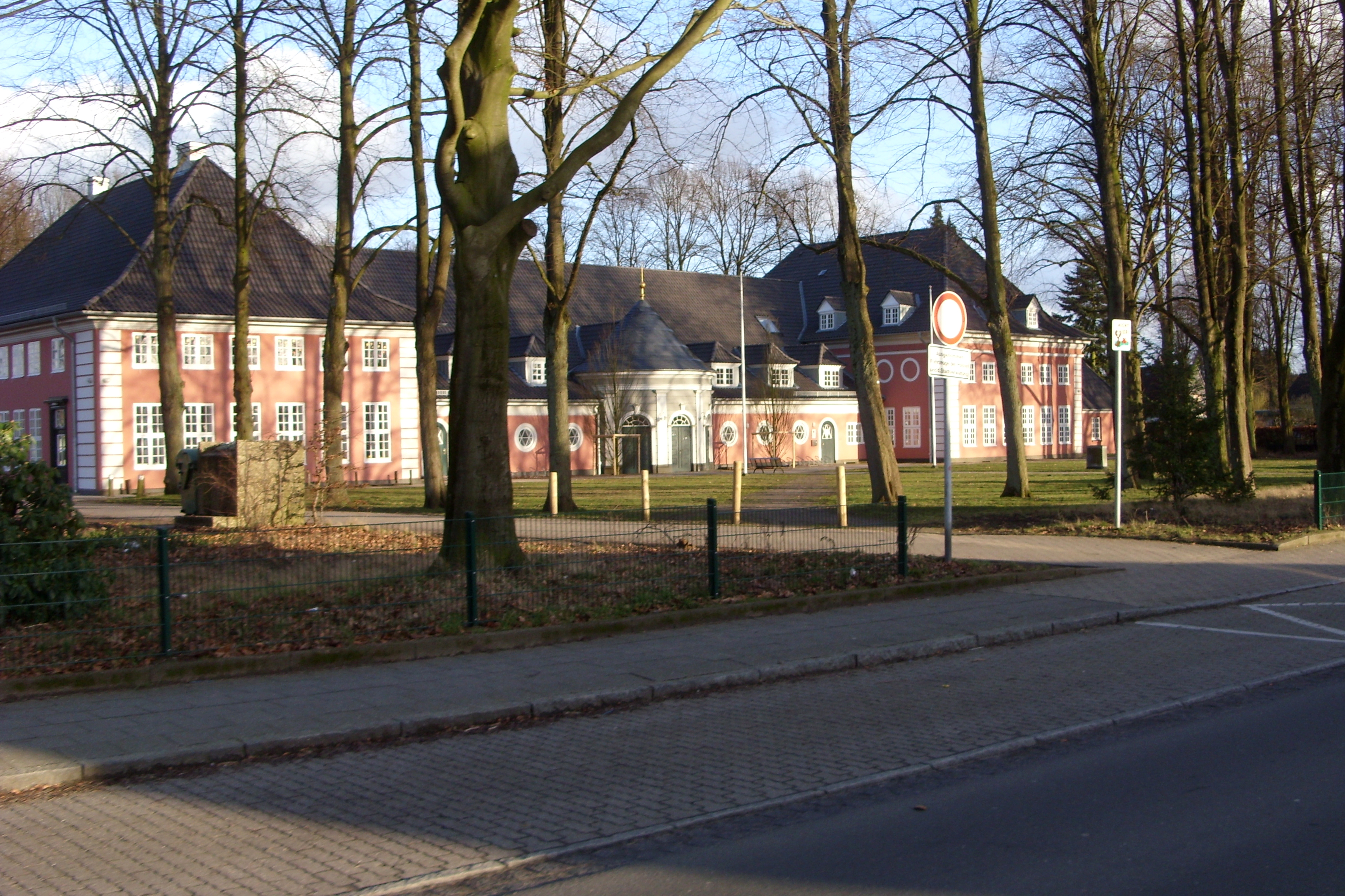 Blick auf das "Volkshaus" in Neumünster/Tungendorf